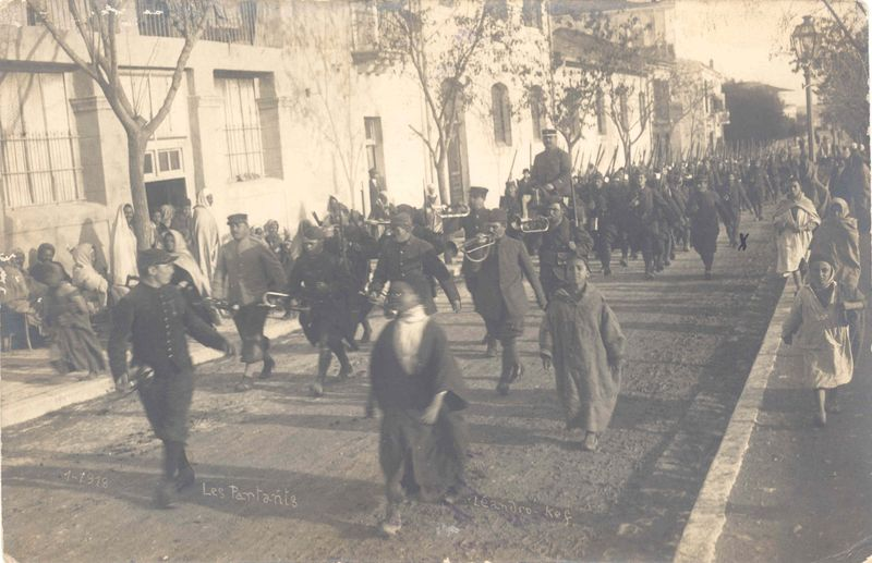 Défilé dans la rue principale du Kef en Tunisie de militaires partant au front en janvier 1918